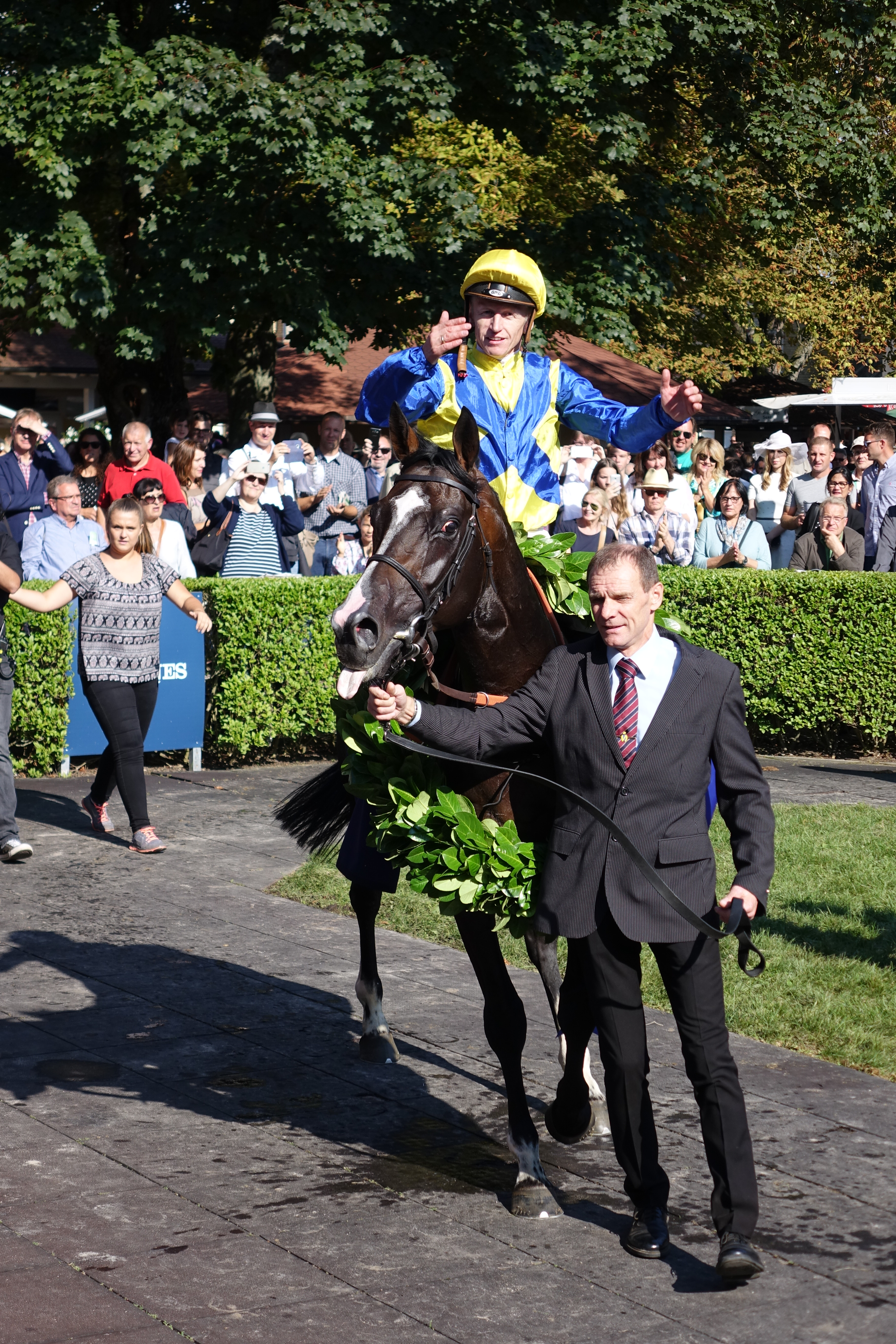 Der siegreiche Hengst Guignol beim Großen Preis von Baden 2017